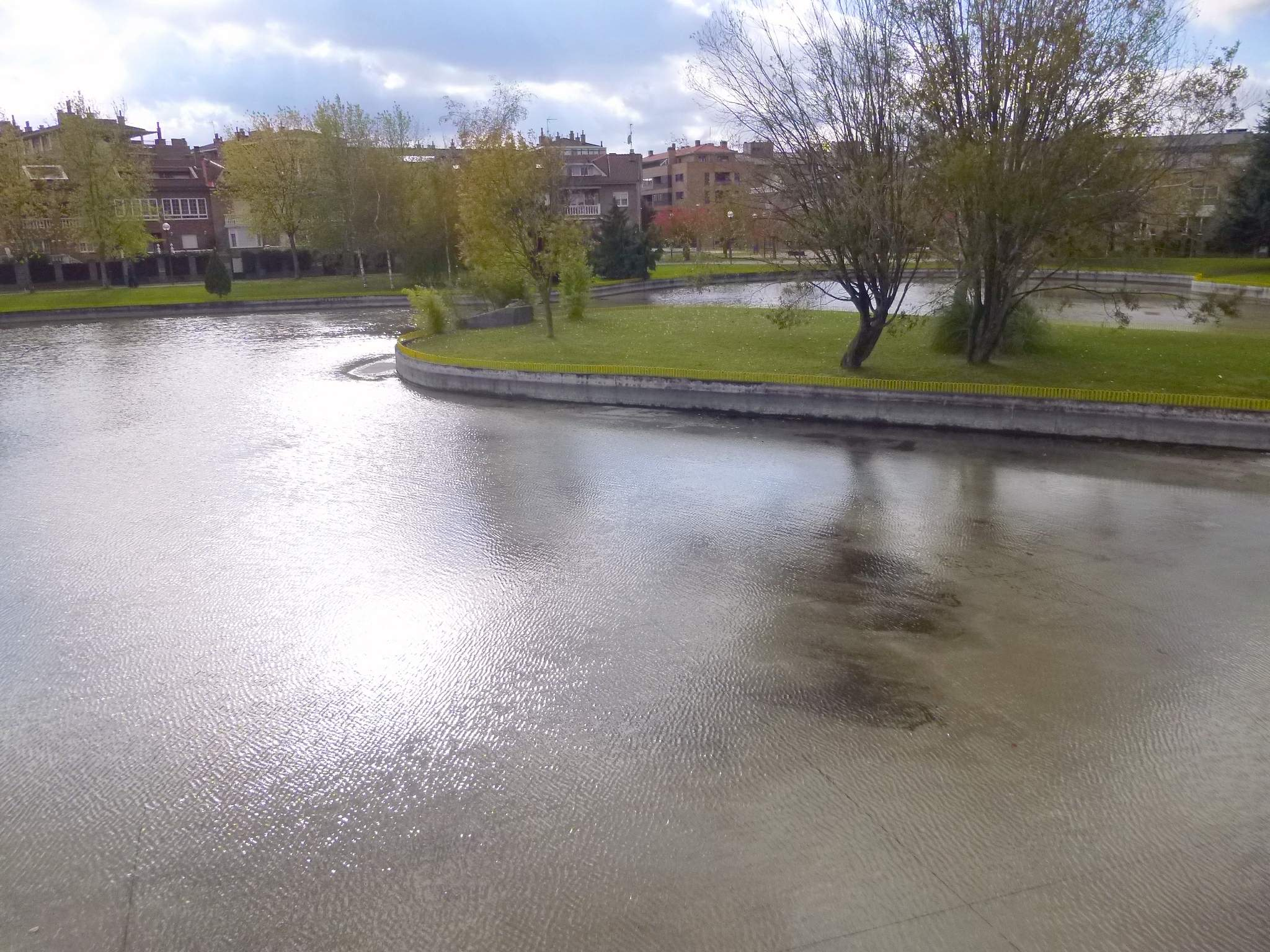 Parque de la Constitución (Barañain, Navarra)